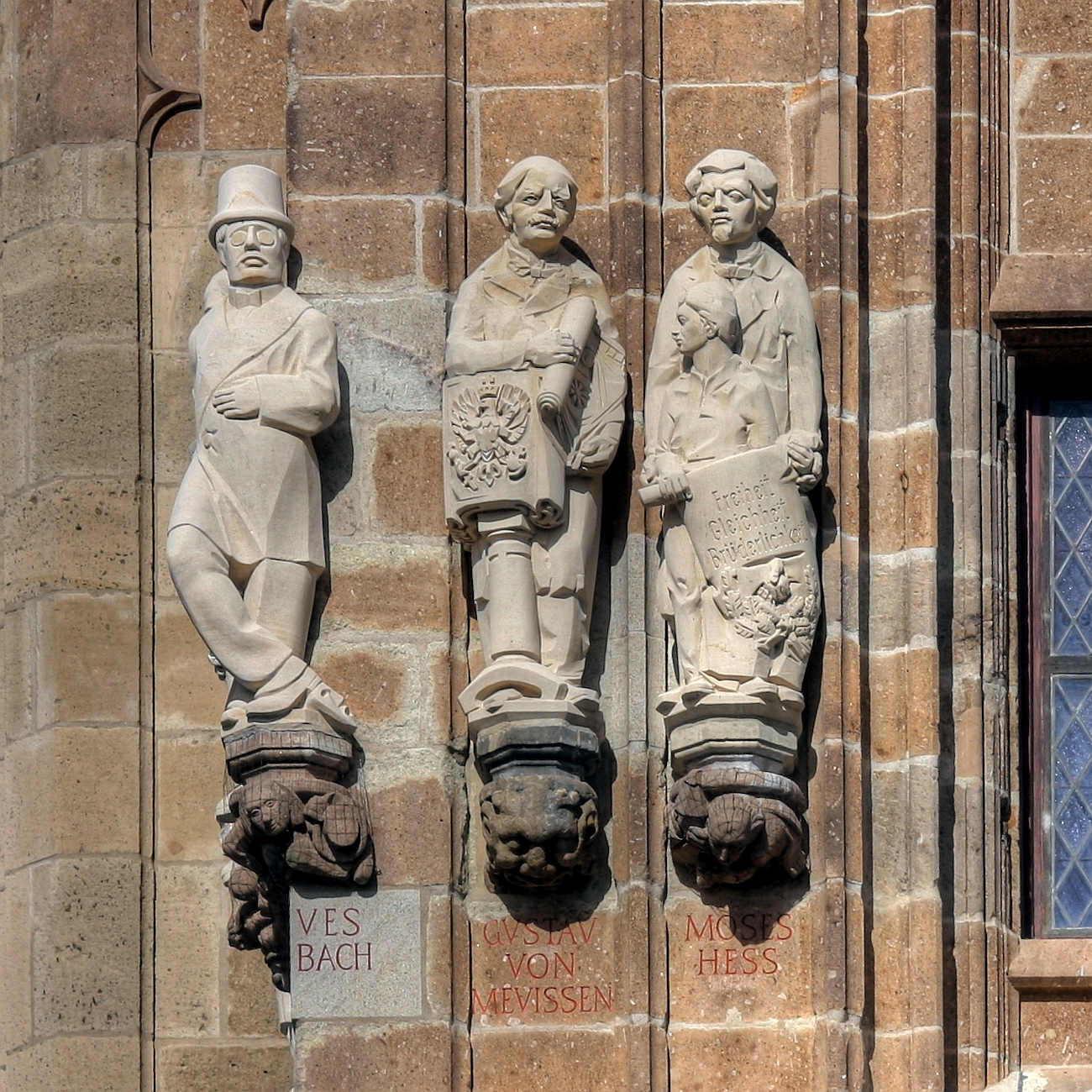 Rathausturm Köln mit den Figuren des Jacques Offenbach, Gustav von Mevissen und Moses Hess Details zu der Statue: Bildhauer der Offenbach-Statue: Klaus Balke Bildhauer der Mevissen-Statue: Heribert Calleen Bildhauer der Hess-Statue: Heribert Calleen Details zu der Konsole: Thema der Konsole unter der Offenbach-Statue: „Dr. Max Adenauer“. Bildhauer: Gerd Haas Thema der Konsole unter der Mevissen-Statue: „Grinkopf“. Bildhauer: unbekannt, Ausführung ~ 1410 Thema der Konsole unter der Hess-Statue: „Eduard Schmitz jun.“. Bildhauer: Gerd Haas